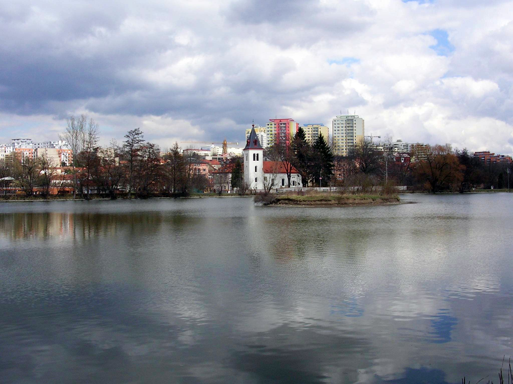 Czech Republic, Praha 10, Záběhlice: Hamerský rybník a kostel Narození Panny Marie. V místě ostrůvku stávala tvrz Václava IV.